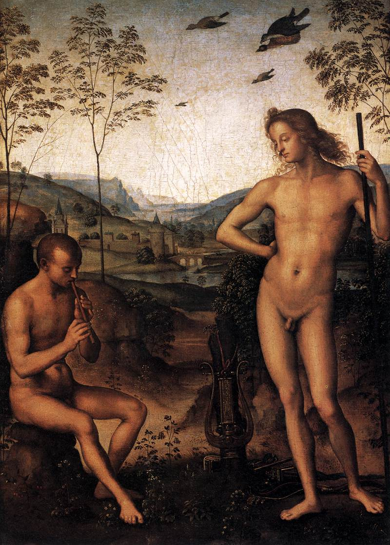 Apollon e il satiro Marsyas